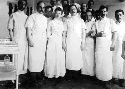 أطباء من كلية الطب جامعة دمشق - سوريا -1920